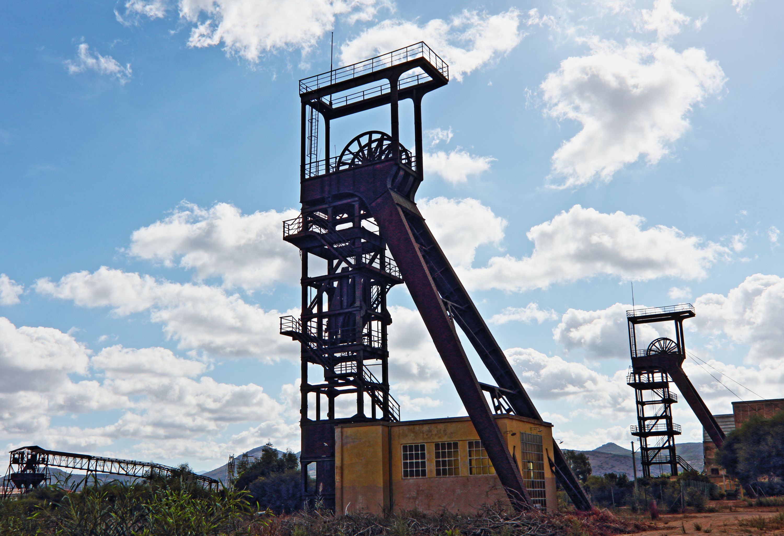 Museo del Carbone Le due torri degli ascensori della miniera, che conducevano rispettivamente nel pozzo 1 e 2. Oggi sono il simbolo della Grande Miniera Serbariu, chiusa definitivamente nel 1964. This is a photo of a monument which is part of cultural heritage of Italy.